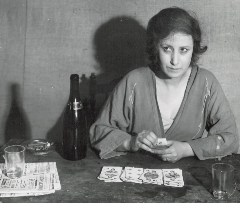 Dagmar Bentzen (1902-1967) in the play Streber by Stig Dagerman at Malmö stadsteater